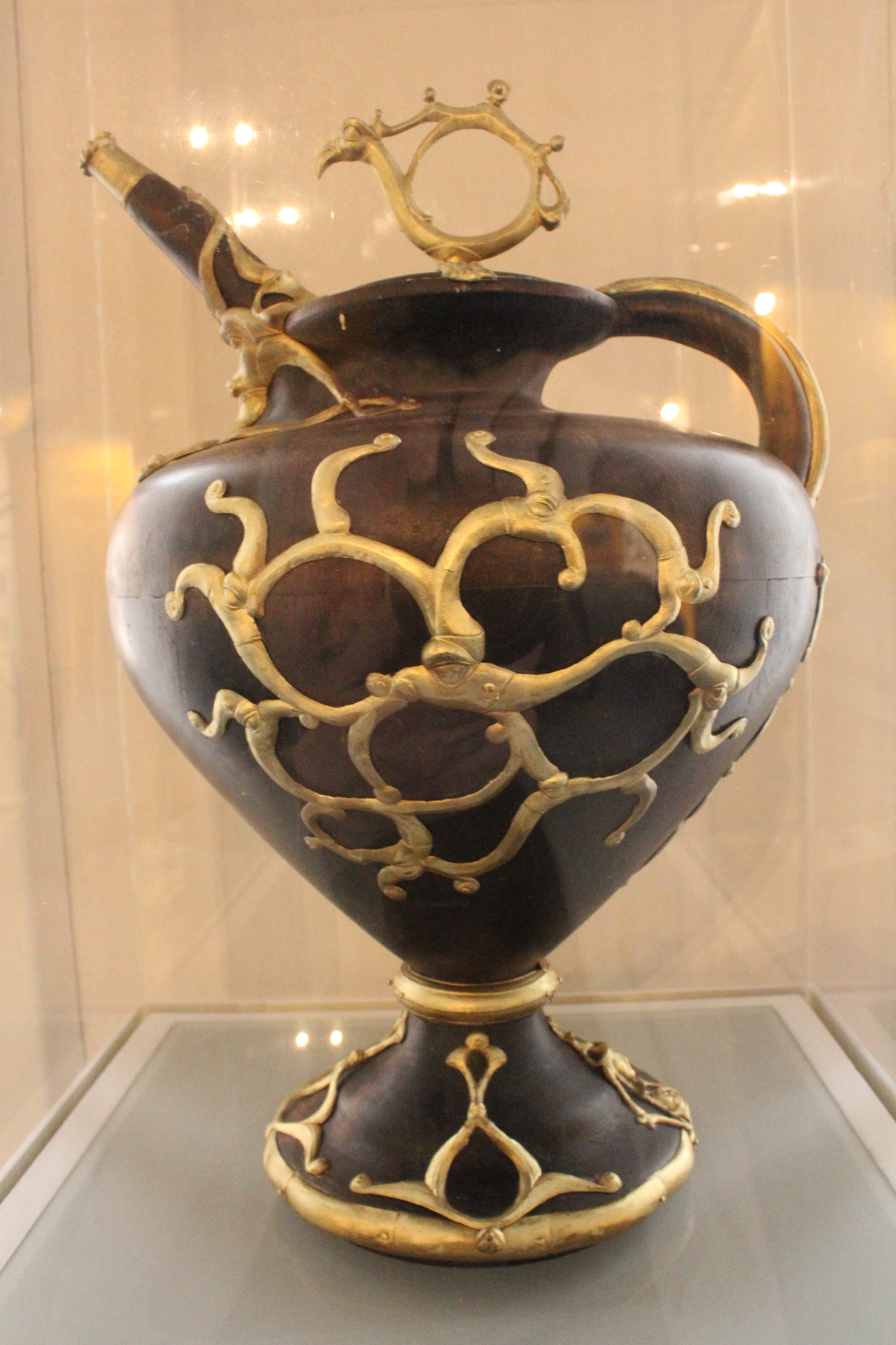 Moravan museum - celtic cartouche Maloměřice burial